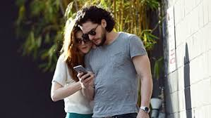 Роуз леслі та Кіт Харингтон